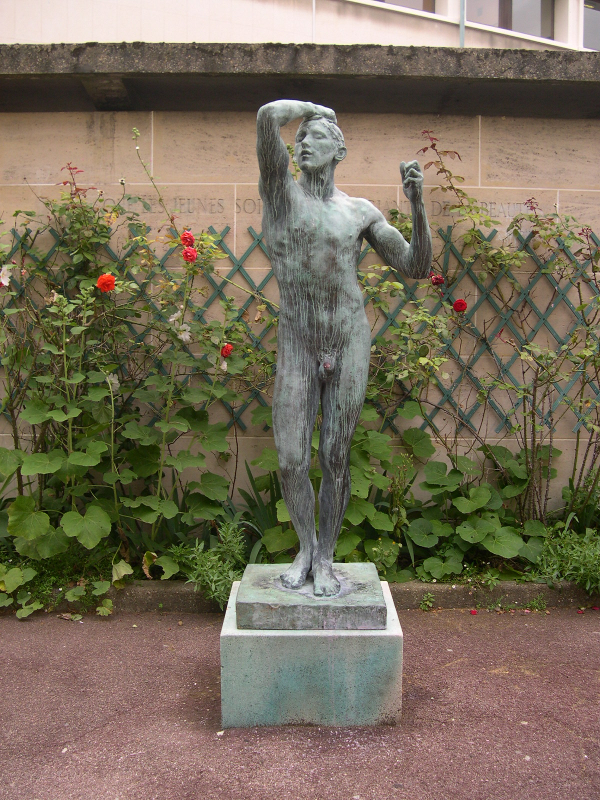 Statue de la cour d'honneur